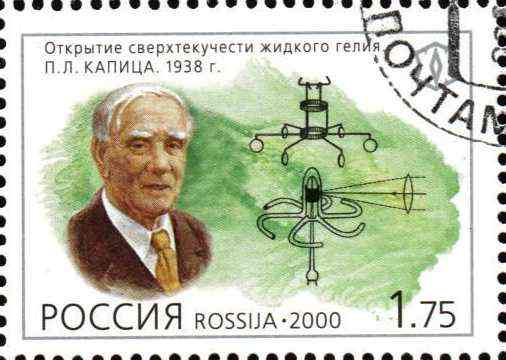 Почтовая марка России - Капица Пётр Леонидович, дважды Герой Социалистического Труда